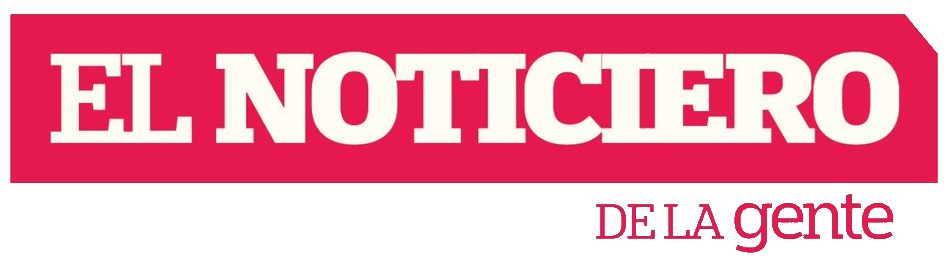 Nuevo logo del noticiero de Telefe